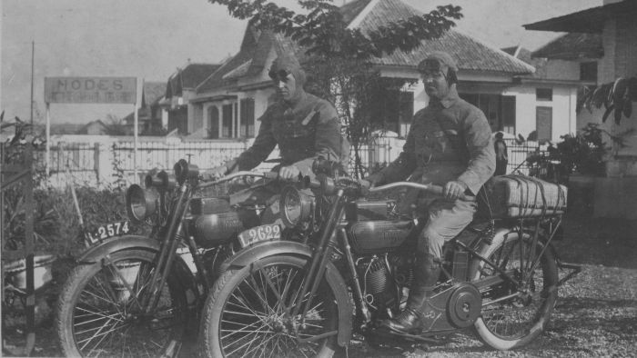 foto. Twee Europese mannen op motorfietsen van het merk Harley Davidson in een straat op Java, klaar voor vertrek